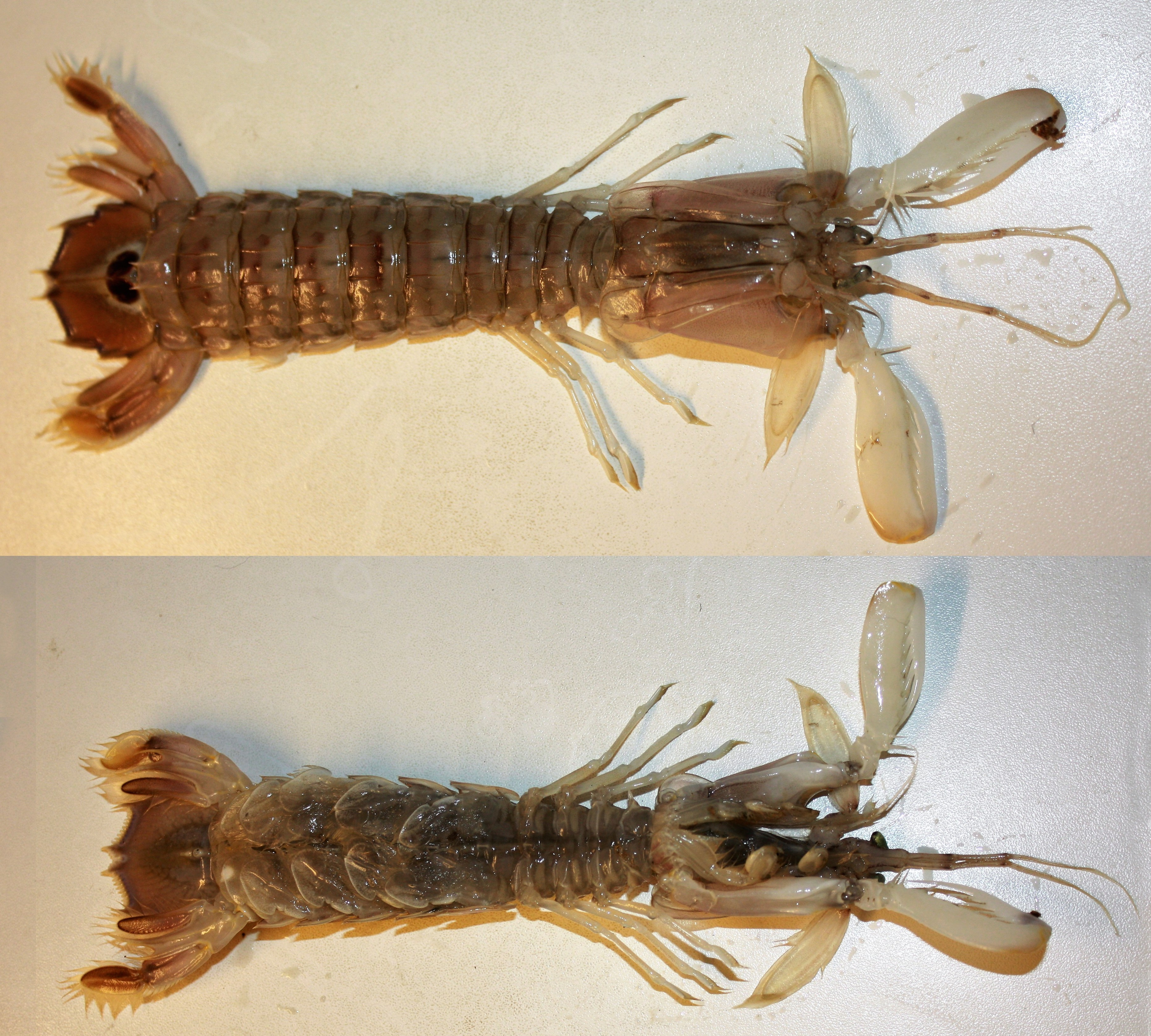 Fangschreckenkrebse